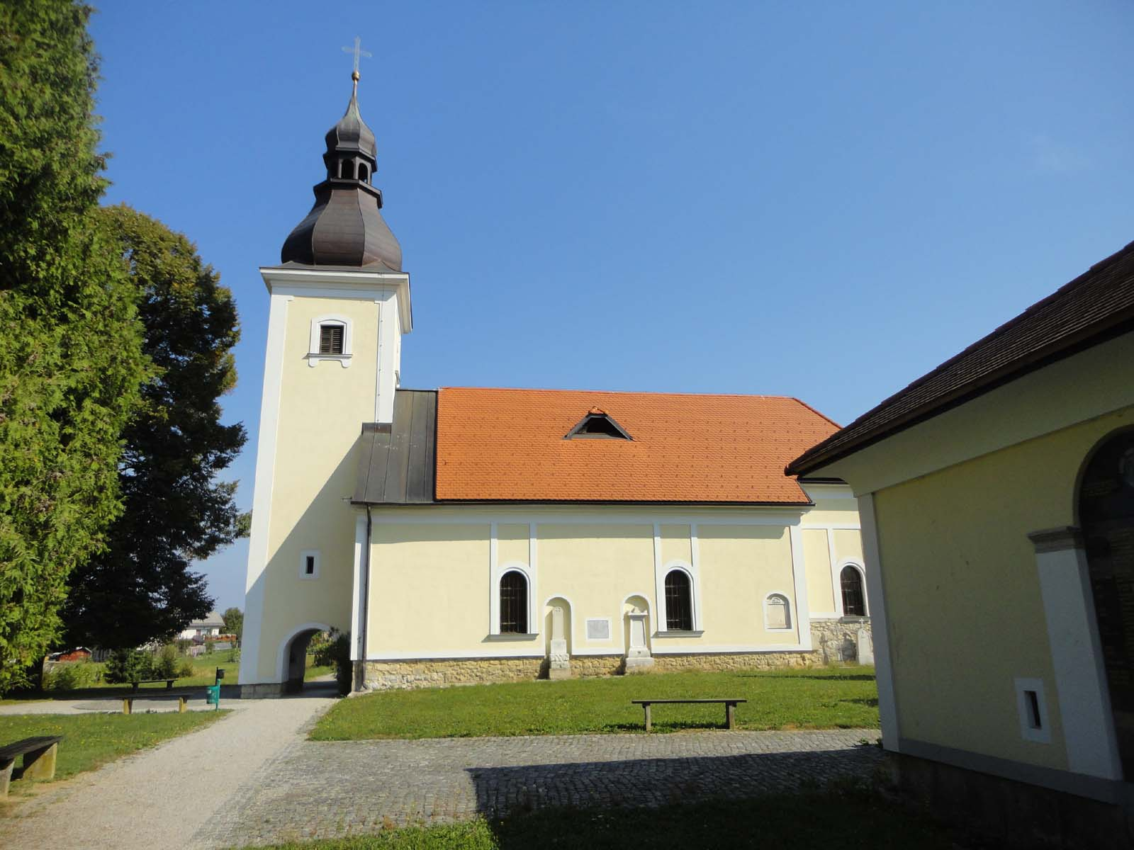 Cerkev Presvetega Rešnjega Telesa, Trata, Kočevje